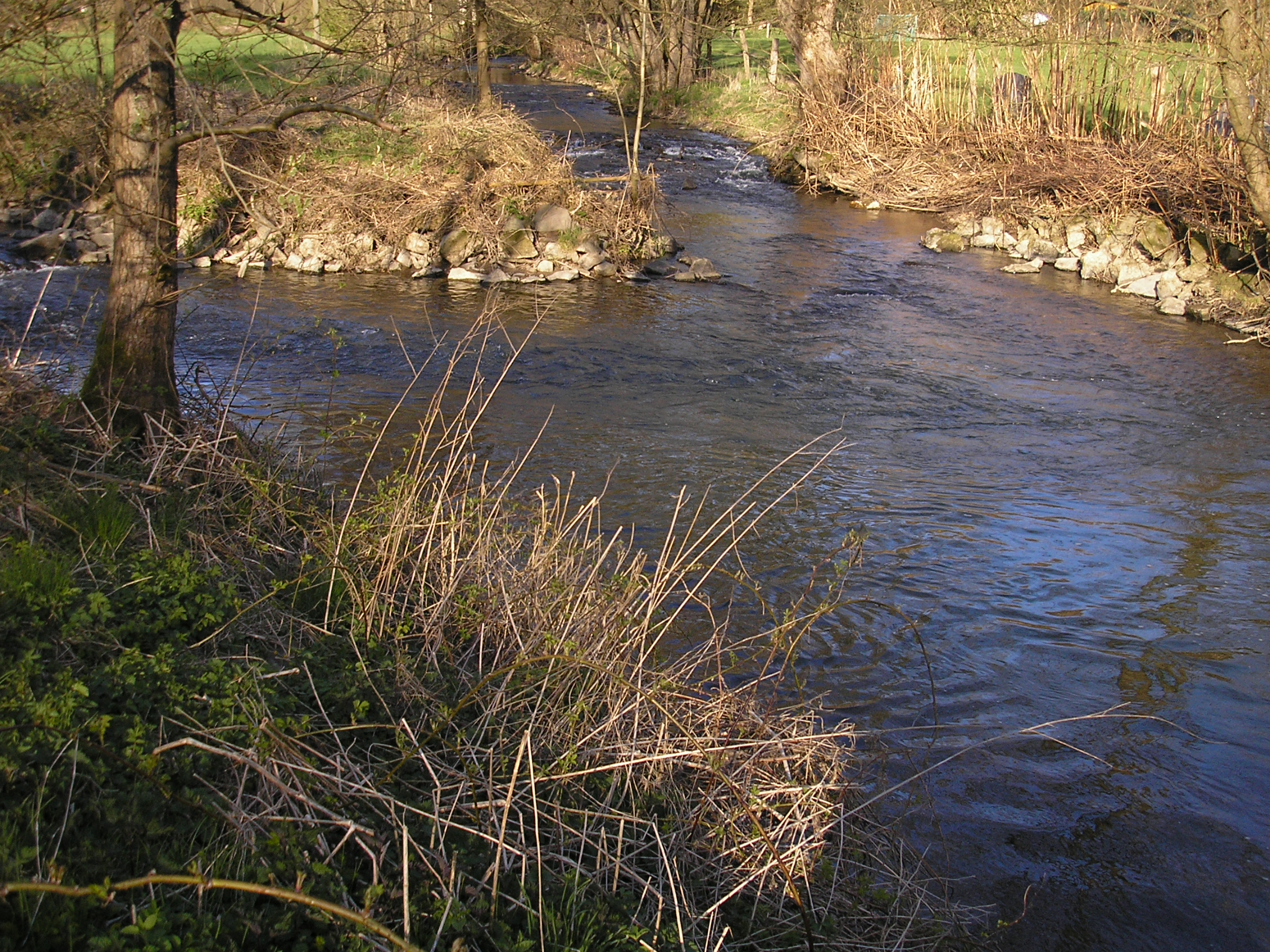 Der Waldbrölbach (oben) fließt bei Bröleck in die Bröl